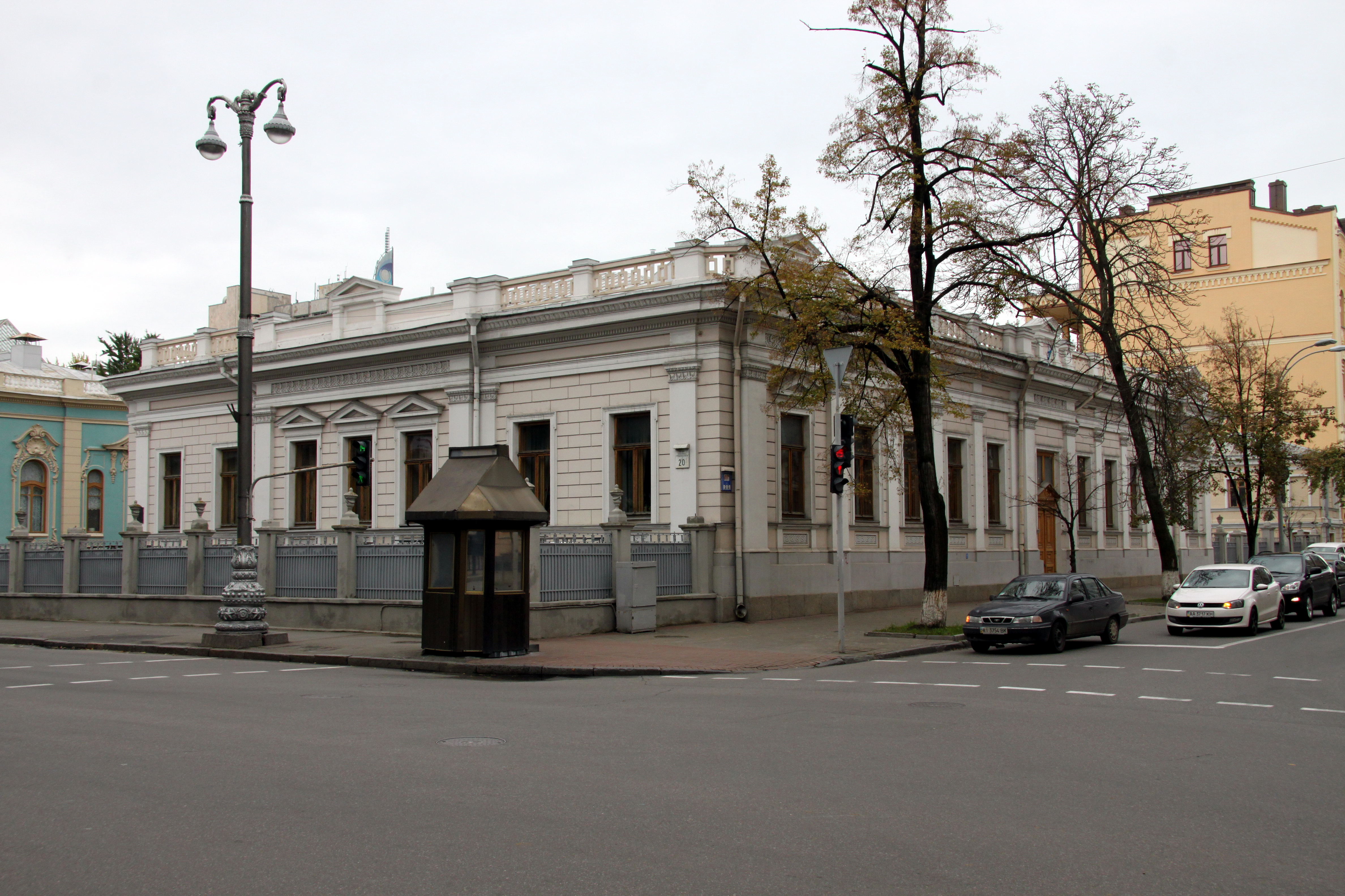 Особняк (Зайцева М. Й.), Київ, Грушевського Михайла вул., 20